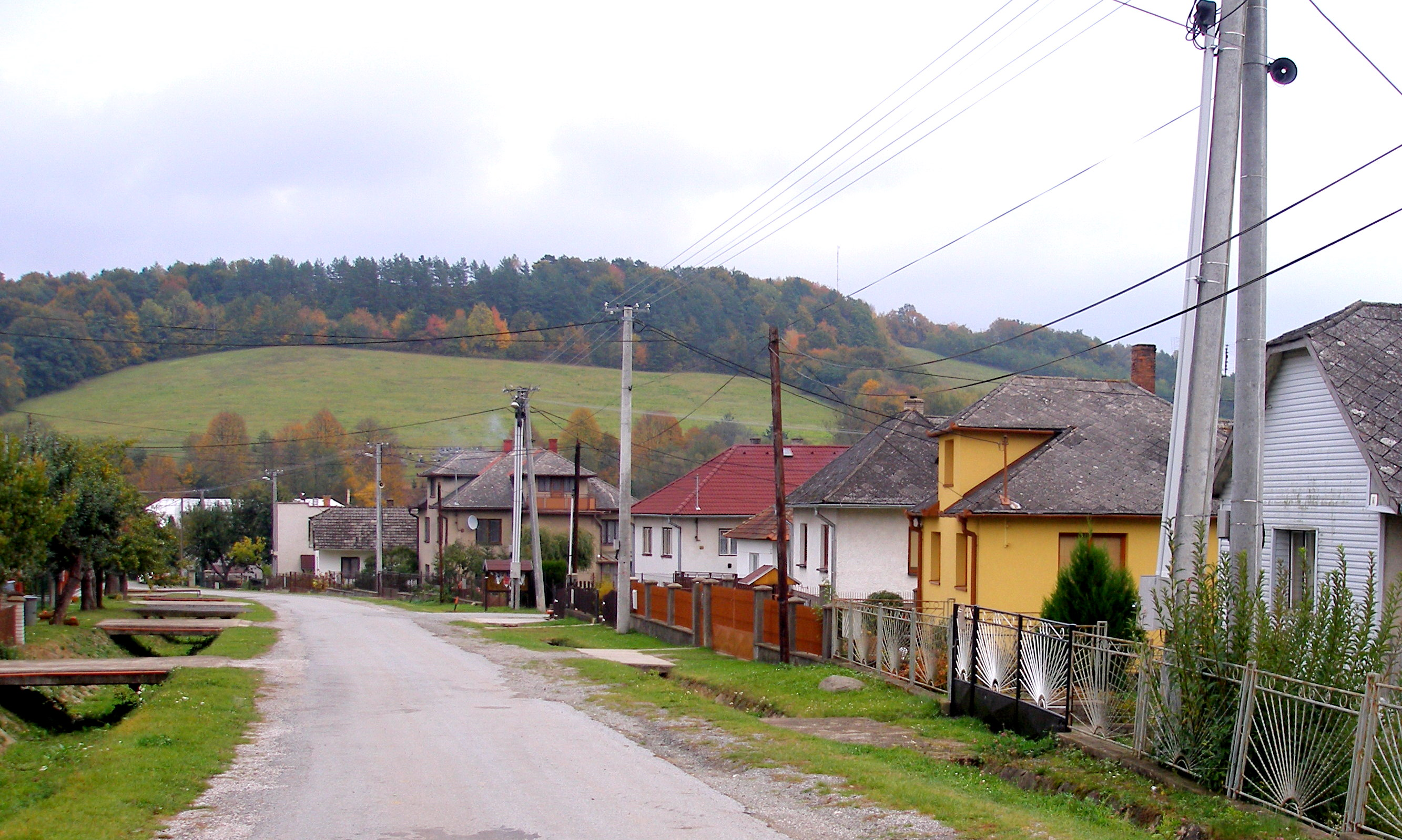 Šarišská vrchovina. Obec Janov. Okres Prešov.